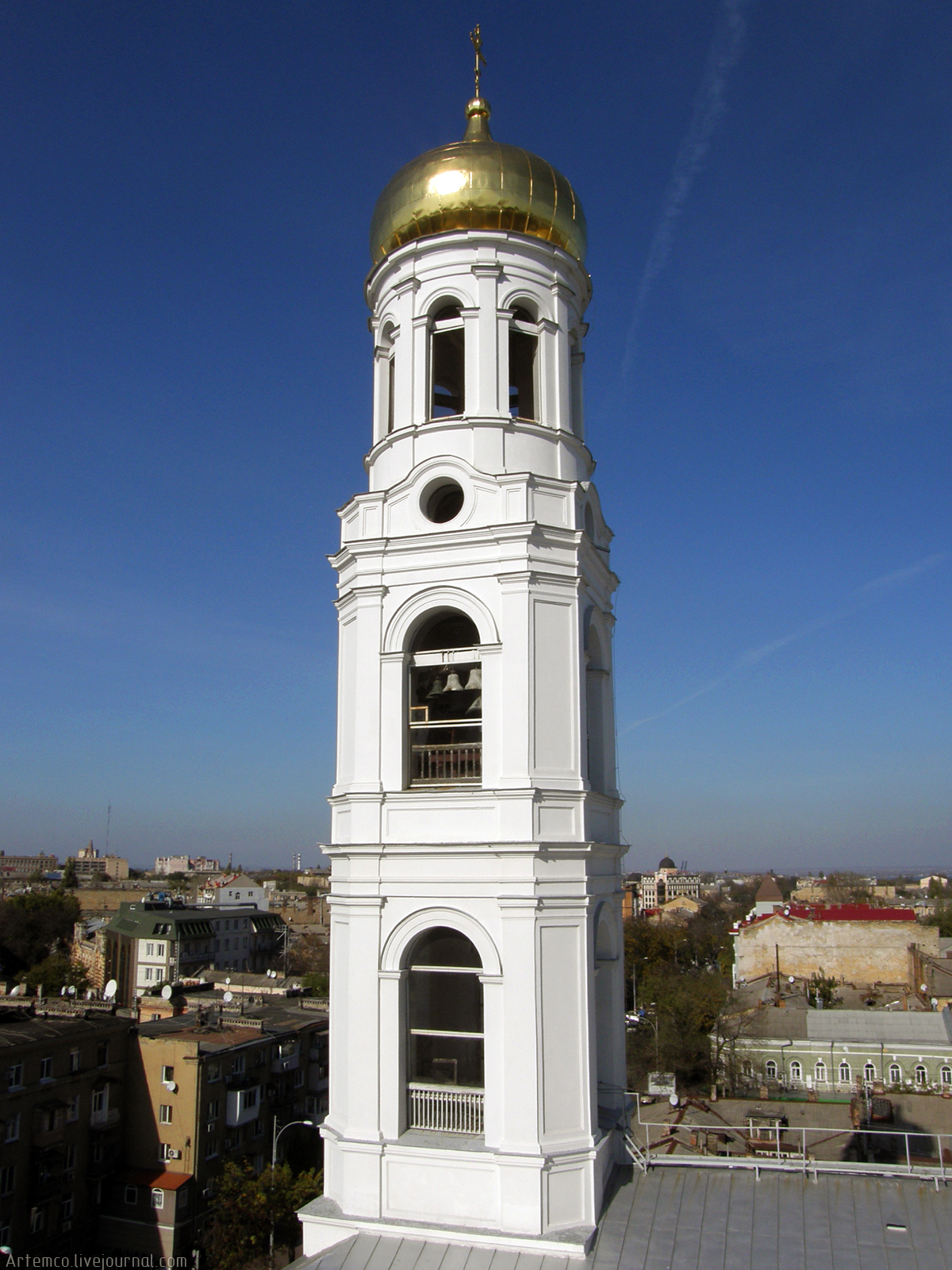 колокольня Успенского собора